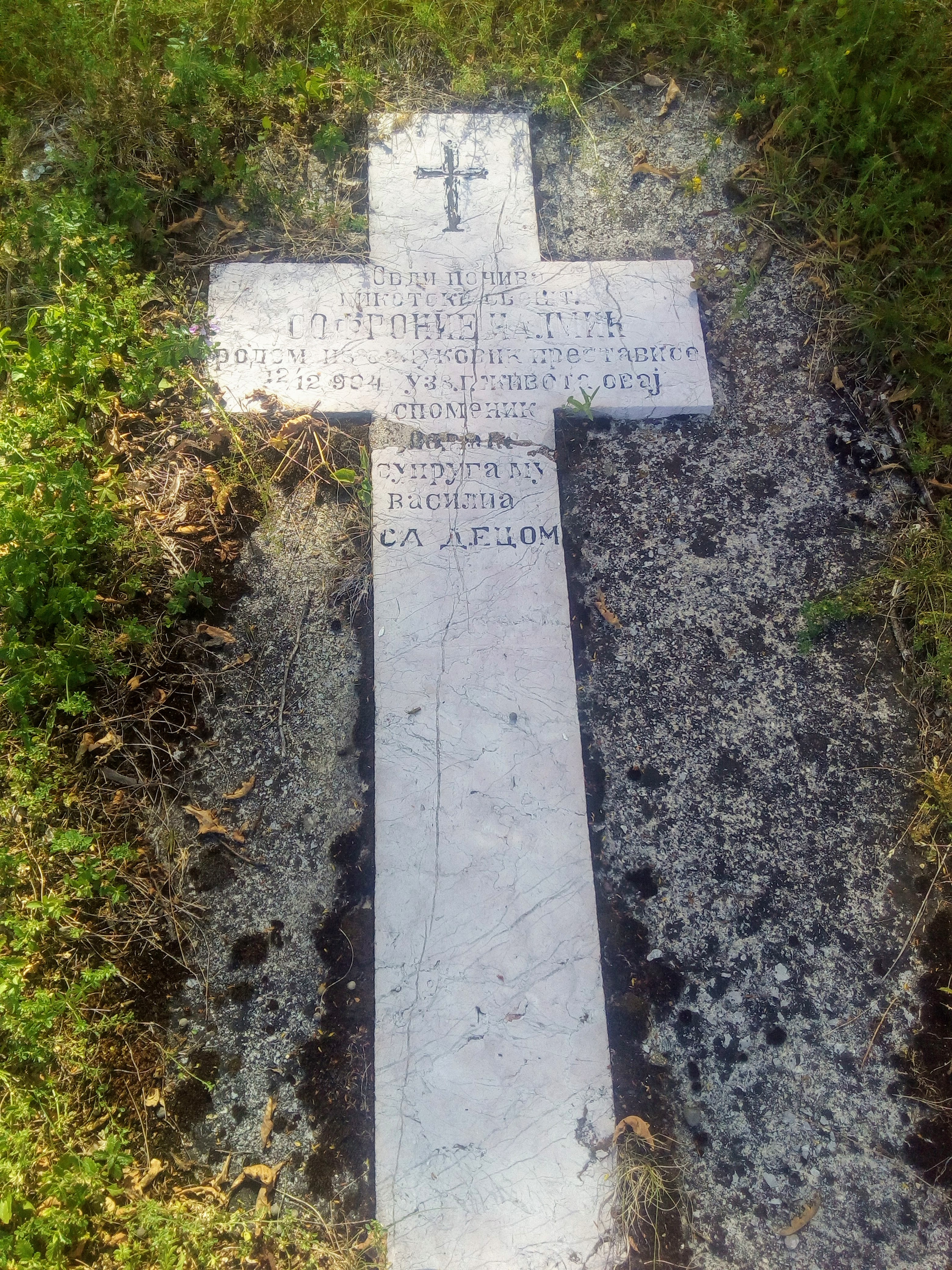 Црква св. Илије , Рудишта